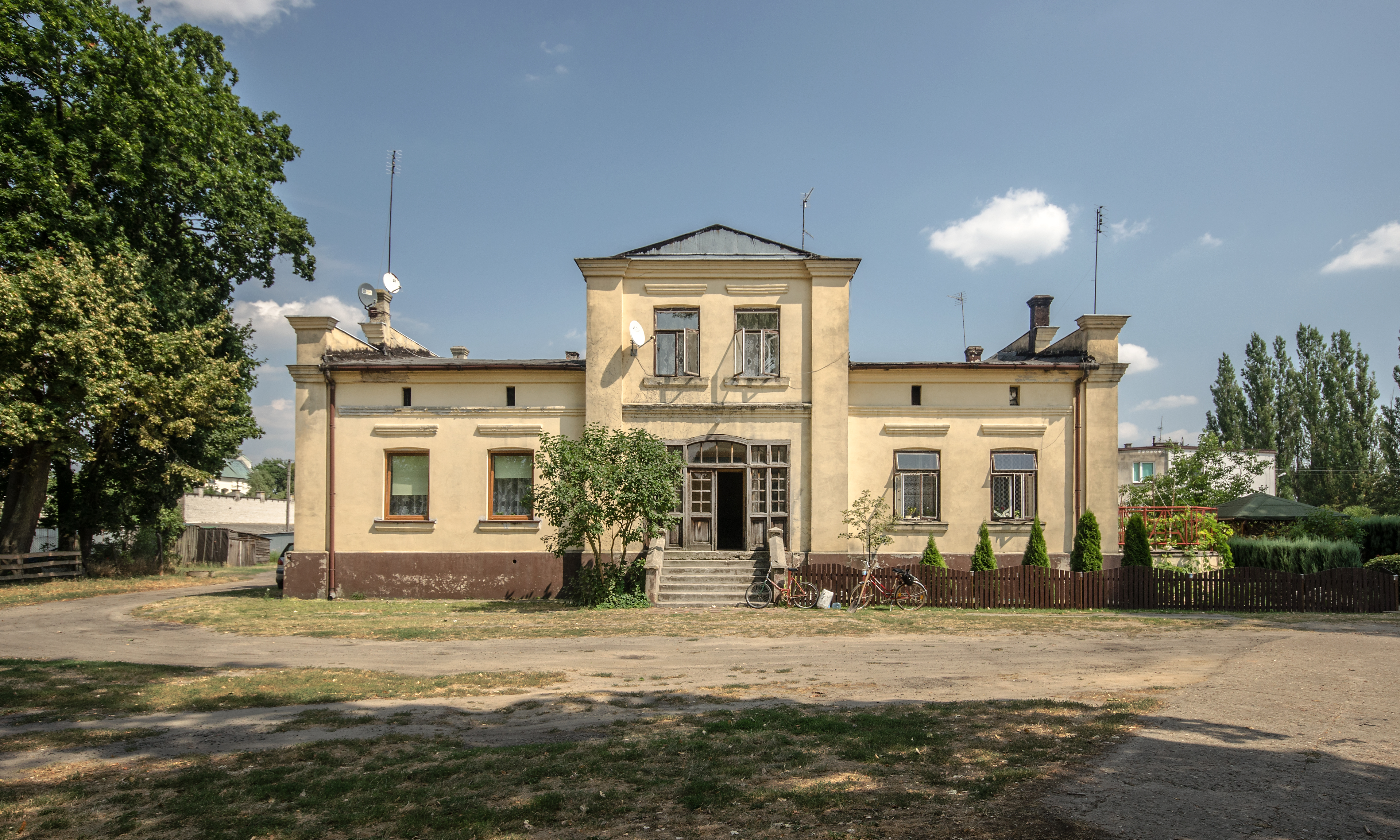 Dwór w Czarnożyłach, gm. Czarnożyły, pow. wieluński, woj. łódzkie